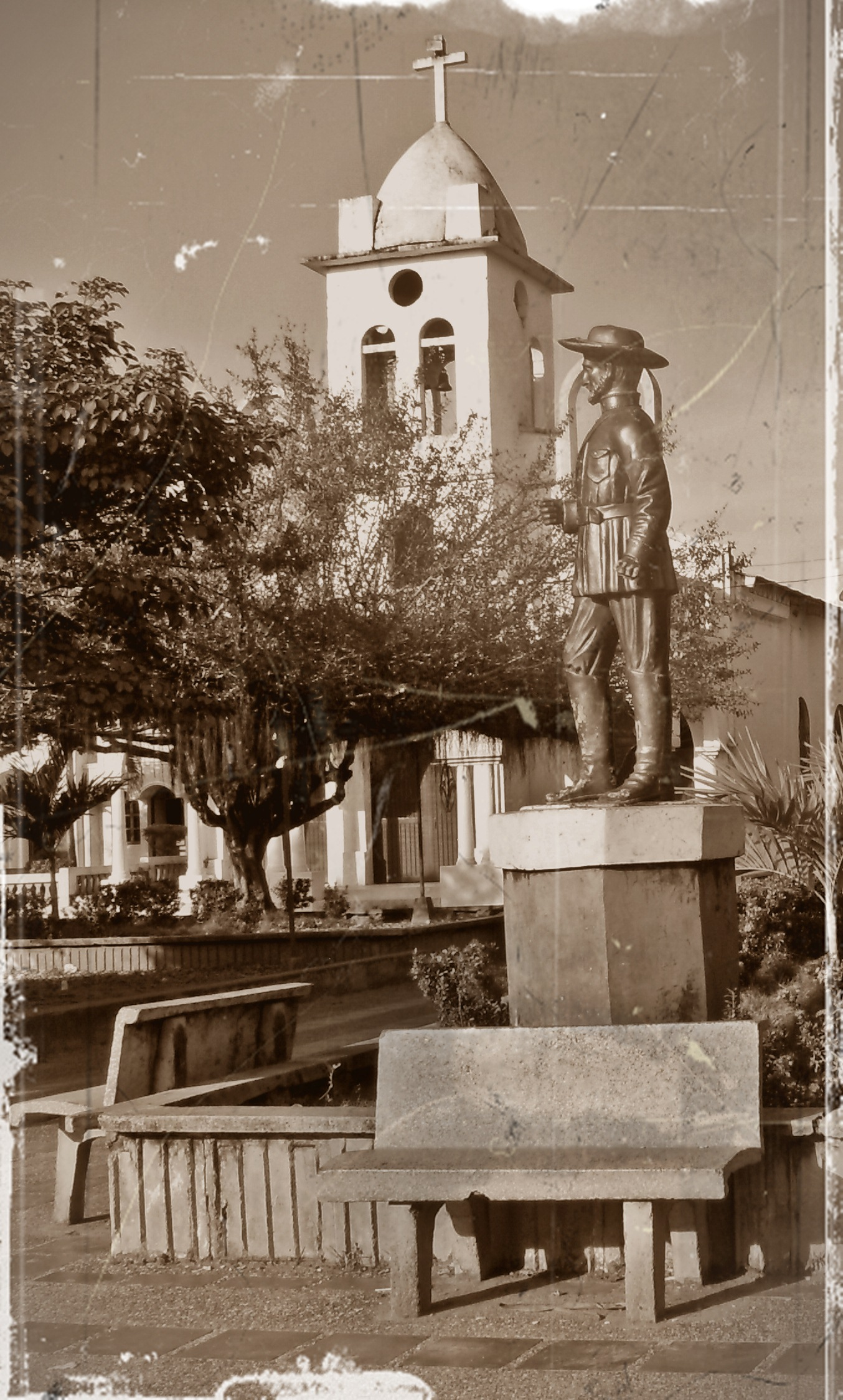 Antonio de la Torre y Miranda, Fundador de Momil - Córdoba